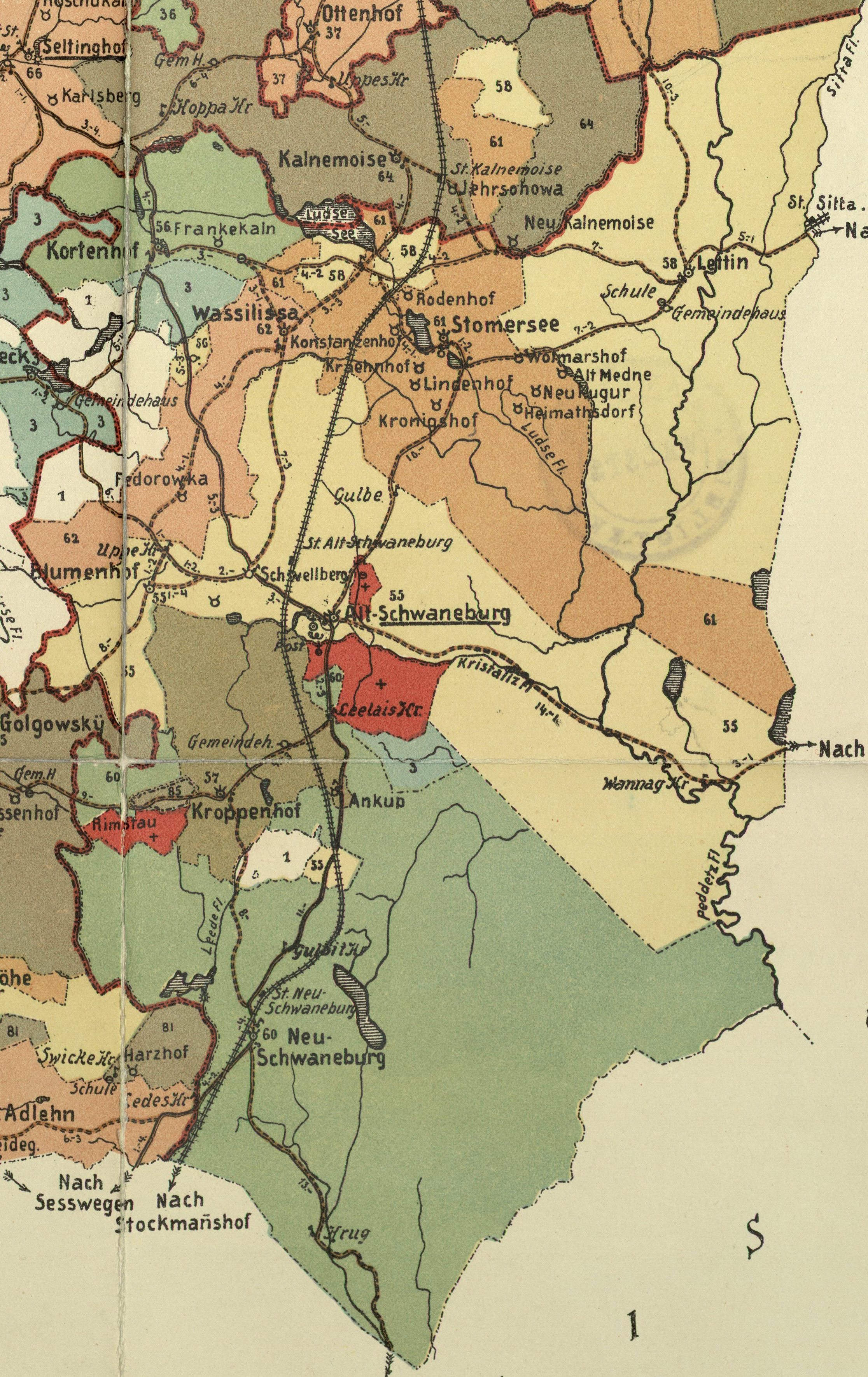 Gulbene kihelkonna mõisad 1904. aasta kaardil.